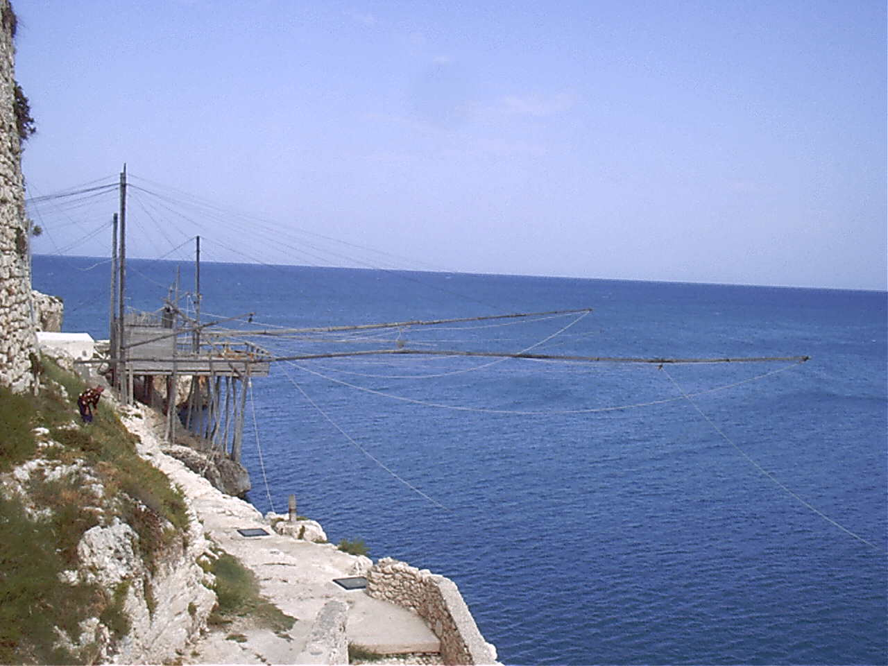 Trabucco di Vieste Immagine personale - Pubblica